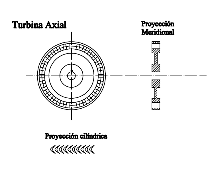 turbina axial de acción